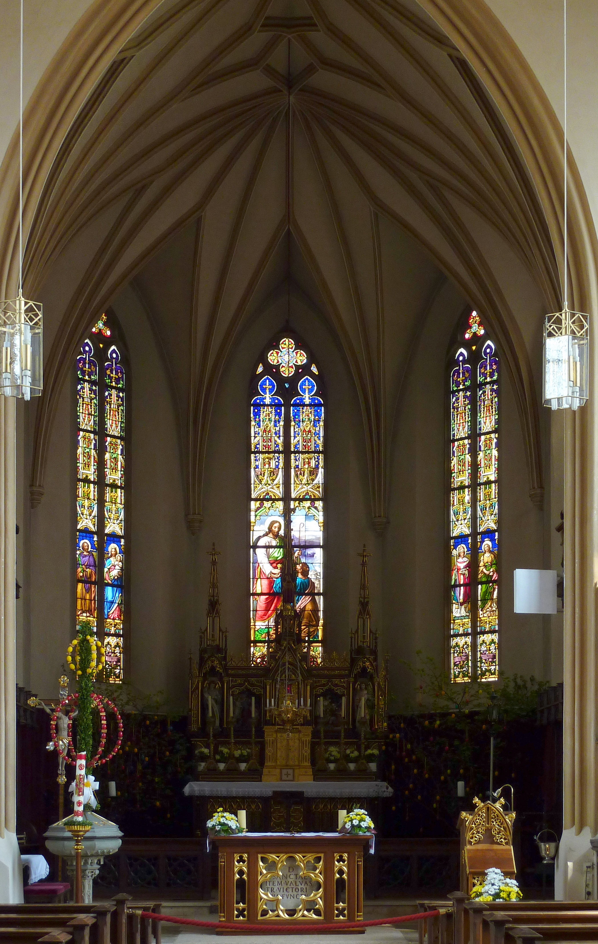 Katholische Pfarrkirche St. Peter und Paul in Hausen, einem Stadtteil von Dillingen im Landkreis Dillingen an der Donau (Bayern), Chor